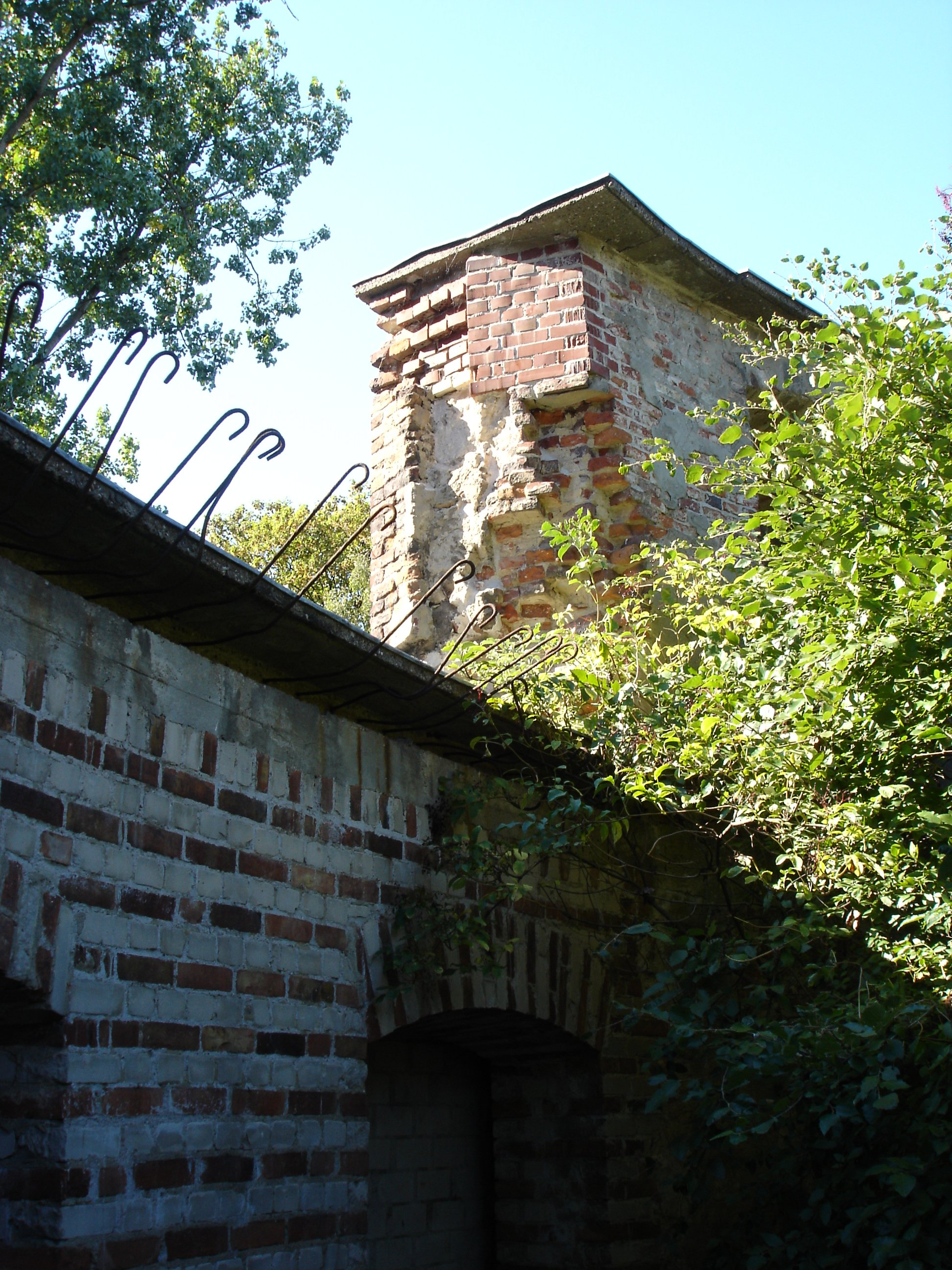 Tag des offenen Denkmals: Aussenmauer des Zwingers in Münster, Deutschland